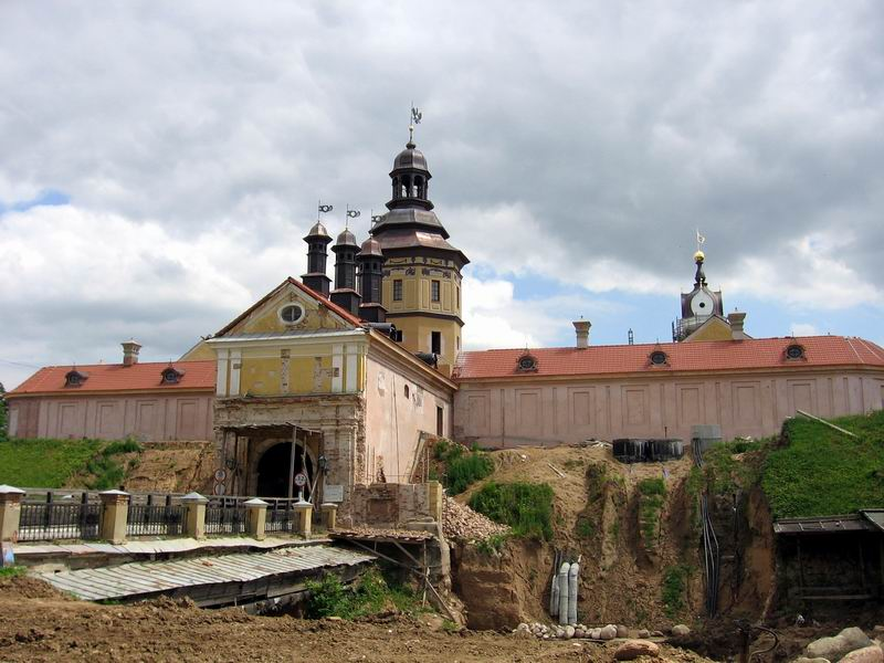 Беларуская (тарашкевіца): Рэстаўрацыя Палацава-замкавага комплексу ў Нясьвіжы